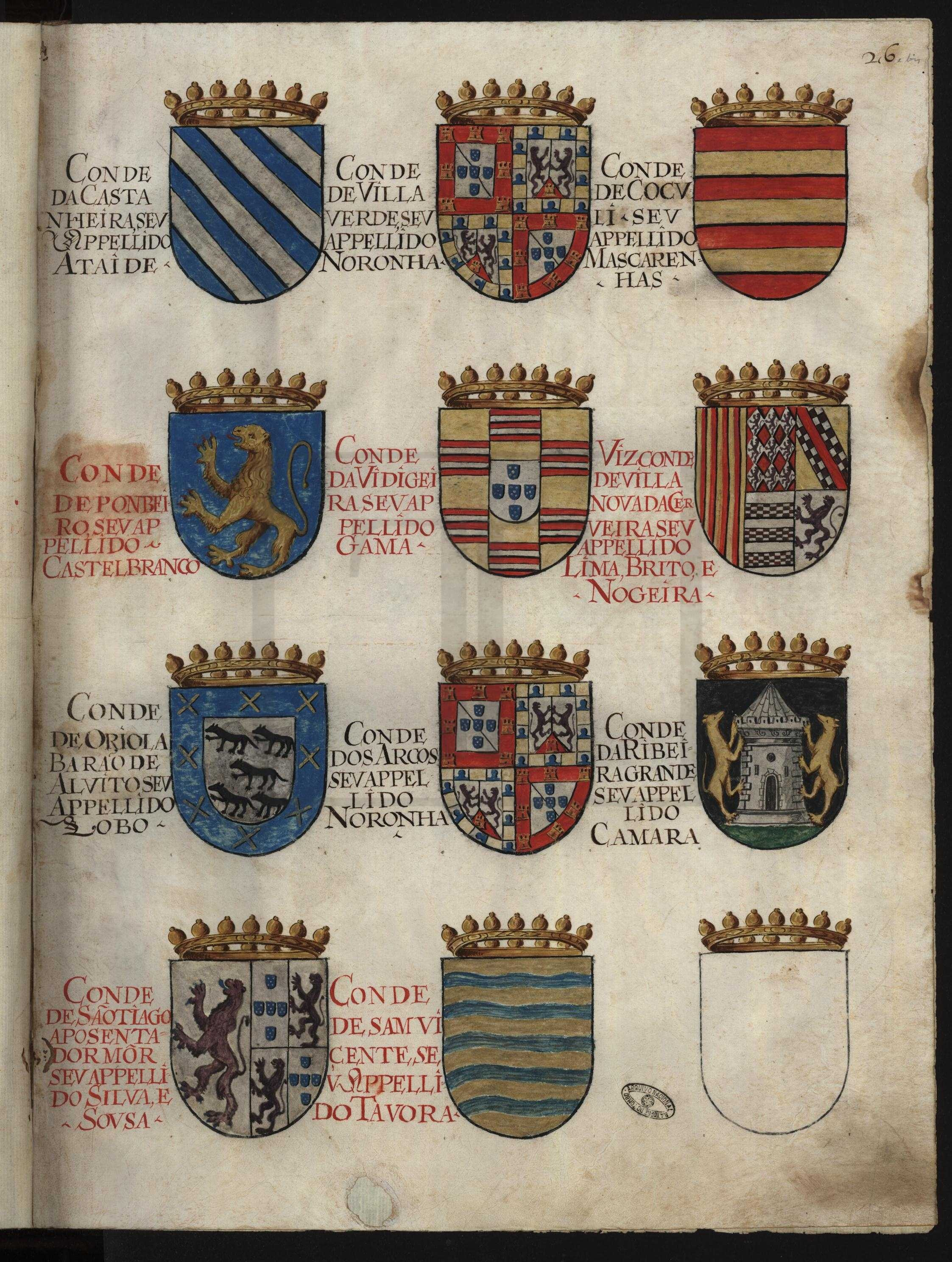 Thesouro de Nobreza, Armas dos Condes de Portugal (fl 26)